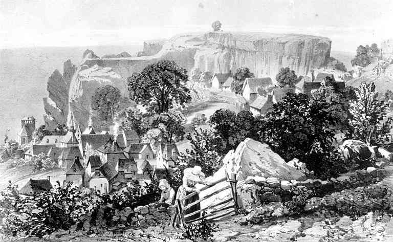 Château de Carlat, lithographie romantique du XIXe siècle montrant le site du château ruiné.